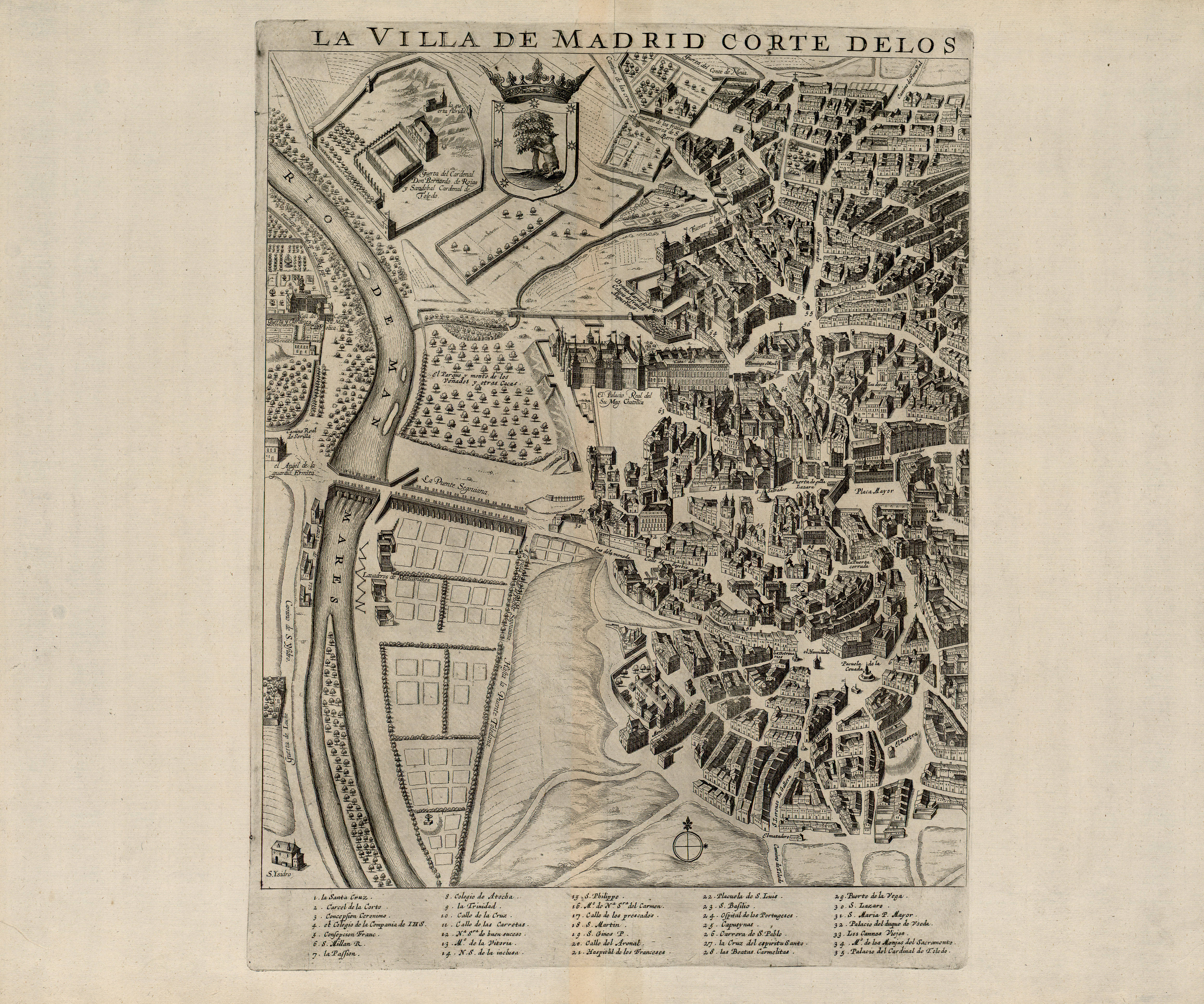 Plancha izquierda de 'La Villa de Madrid Corte de los Reyes Católicos de Espanna'; se aprobó su impresión en septiembre de 1622 y se realizó en 1623. El plano, «dibujado en perspectiva caballera», está dividido en dos planchas que dan una idea aproximada del Madrid de los años 1614 a 1622. Se considera el mapa conocido más antiguo de la Villa. Esta es una reedición del grabador holandés Frederic de Witt, hacia 1635.(Mapa de Antonio Mancelli 1622-1635 del original digitalizado por la Biblioteca nacional de España)